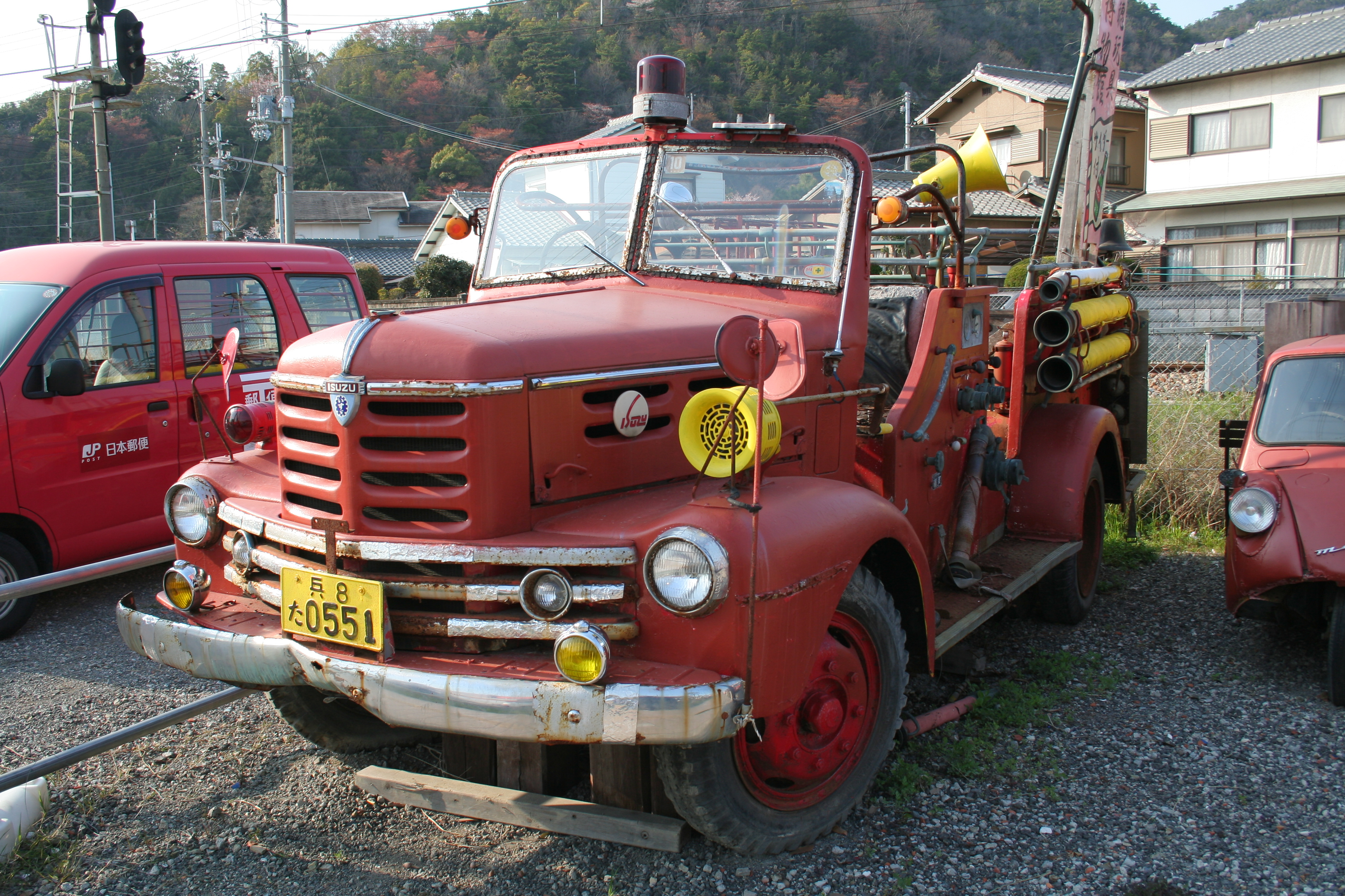 イスズの消防車。